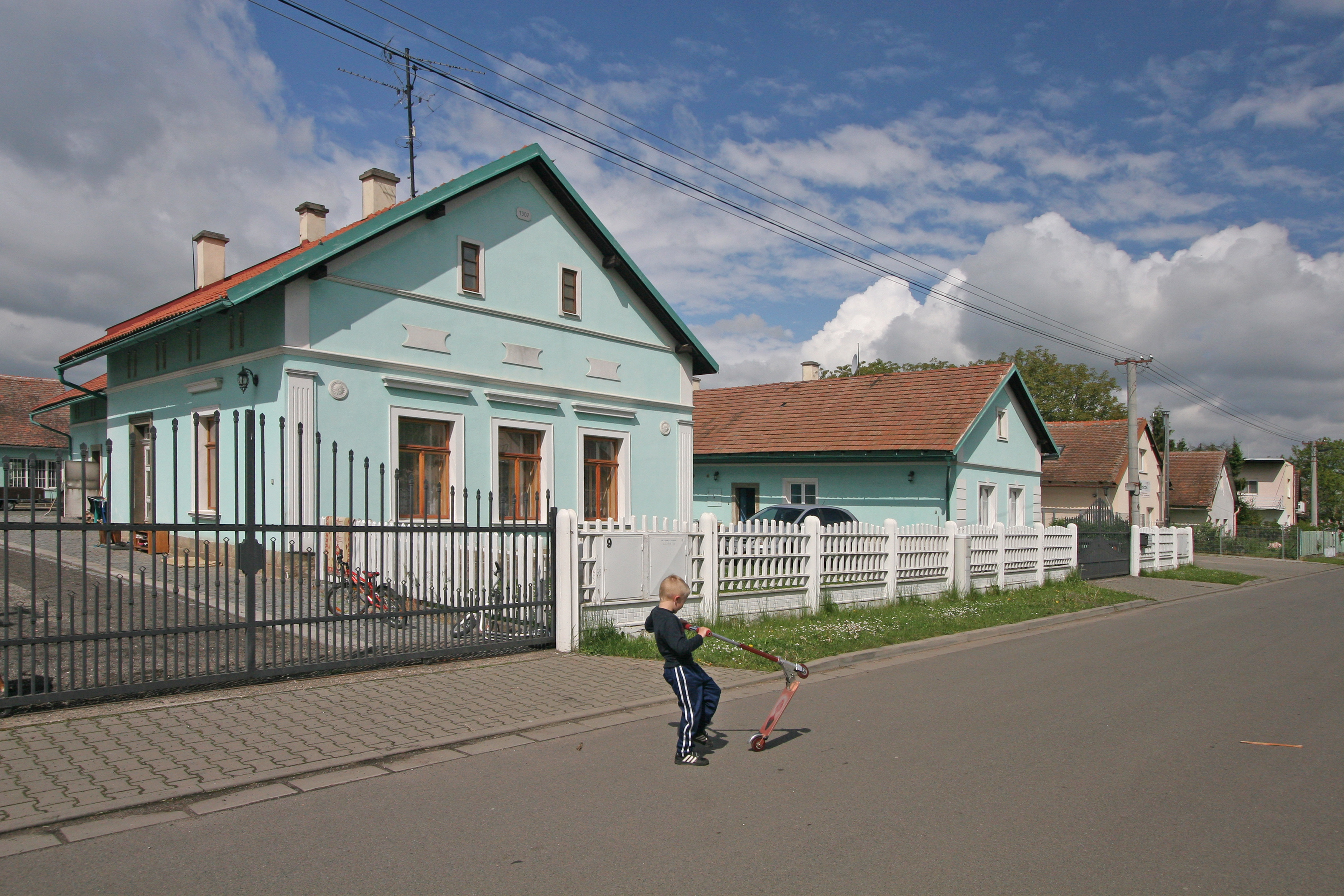 Blato čp. 9